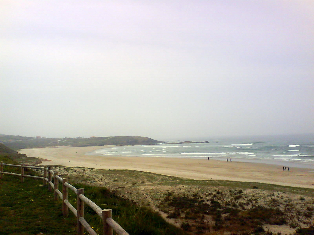 Praia de Alba, Sabón, parroquia de Oseiro, Arteixo, A Coruña, Galicia